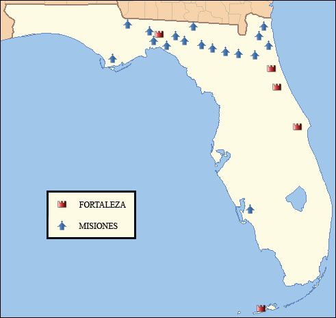 Localización de fortalezas y misiones en el estado de Florida antes del 1700. Un mapa basado en datos del Florida Center for Instructional Technology publicados en este enlace.